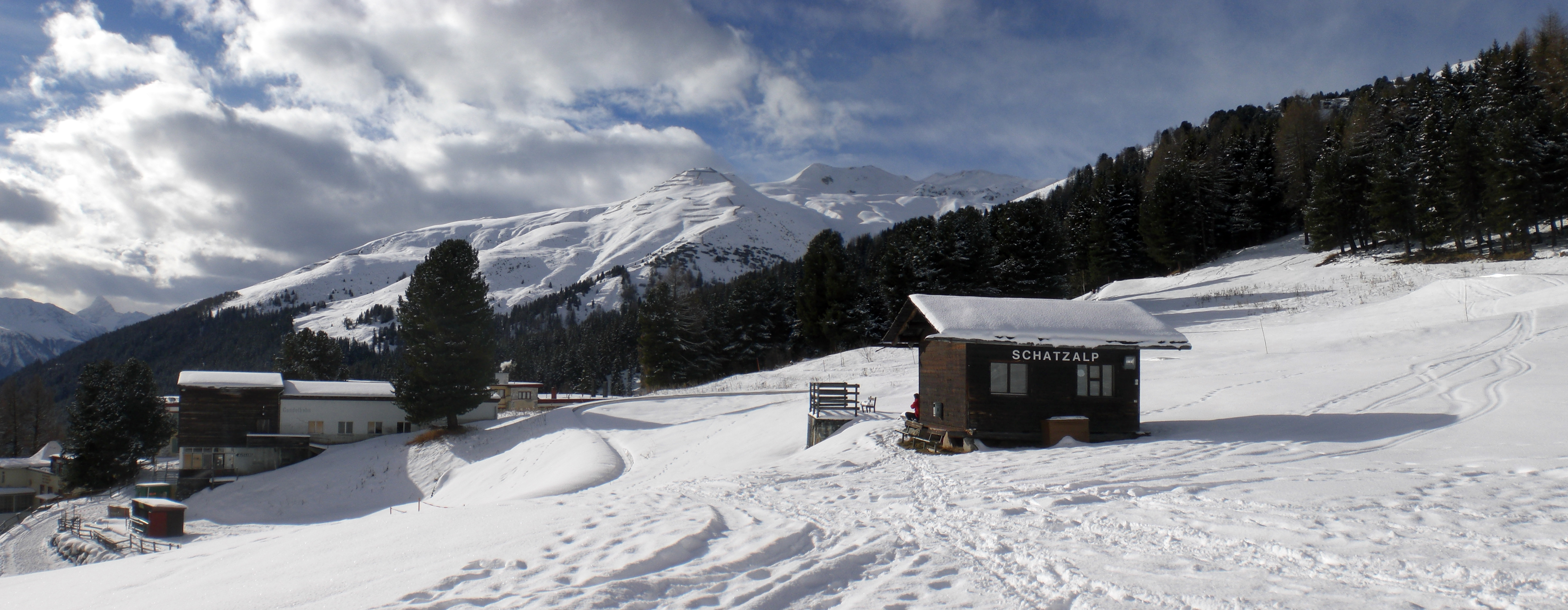 Schatzalp mit Sommerrodelbahn und dem dahinter liegenden Gebäude der stillgelegten Gondelbahn hoch auf den Berg. Ganz links daneben die Bergstation der Schatzalp Bahn (Die Talstation liegt ganz unten im Tal im Ortsteil Davos Platz). Bei den schneebedeckten Bergen im Hintergrund fällt zunächst der Grüeniberg oberhalb des Waldes auf: Bei Vergrösserung kann die im Jahr 2014 fertiggestellte Lawinenverbauung am dort aufragenden Grüenihorn (Verwehungsverbau) erkannt werden. Rechts daneben ist das Hanengretji zu sehen, ein buckeliger Grat mit Panoramablick, von dem aus auch das langgesteckte Berghotel auf der Schatzalm gesehen werden kann. Bei dem im Januar 2016 aufgenommenen Foto mit tiefstehender Sonne sind etwas undeutlich oberhalb der Holzhütte in Bildmitte Chörbsch Horn und die Mederger Flue rechts vom Hanengretji zu erkennen.